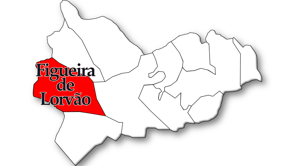 População